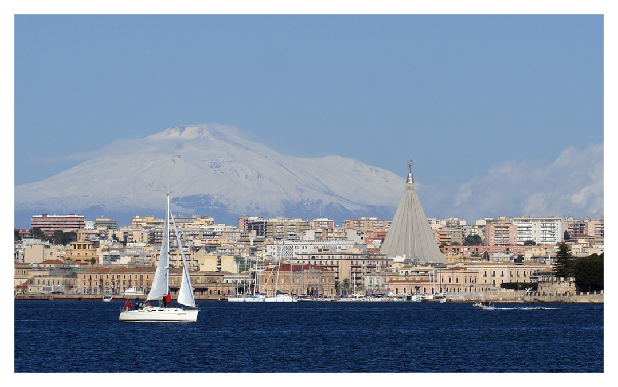 Barca a vela con sfondo del santuario, l'Etna, nel porto grande di Siracusa